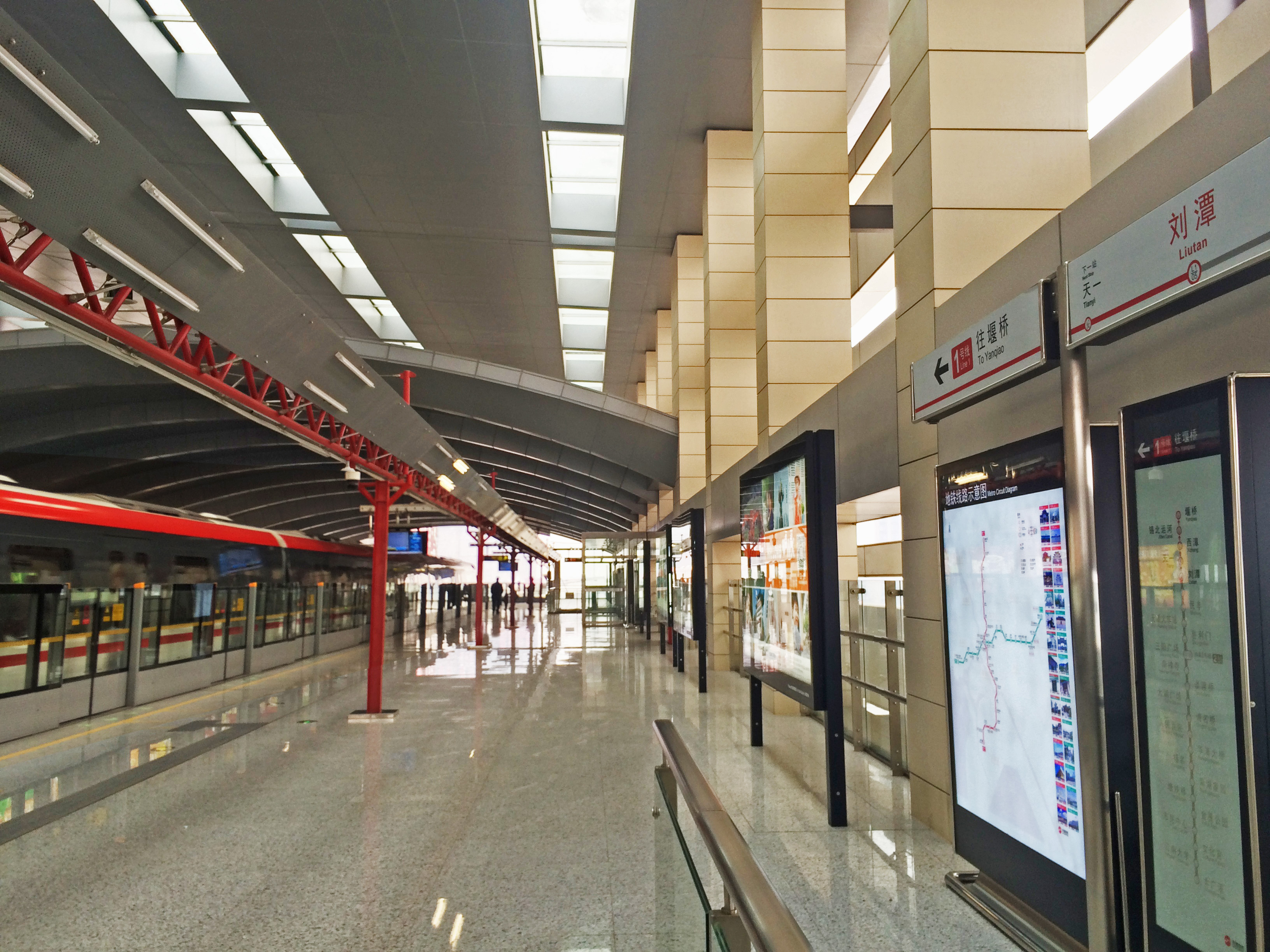 無錫地鐵劉潭站站臺